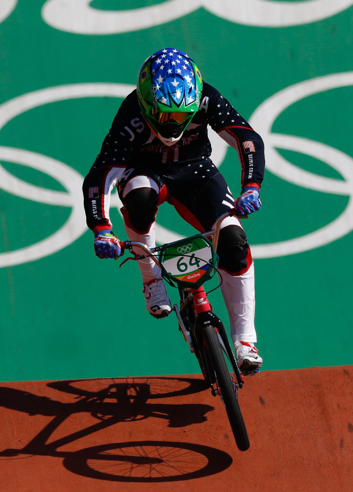 Rio de Janeiro - Ciclista norte-americano Nicholas Long compete BMX nos Jogos Olímpicos Rio 2016, no Parque Radical em Deodoro (Fernando Frazão/Agência Brasil)